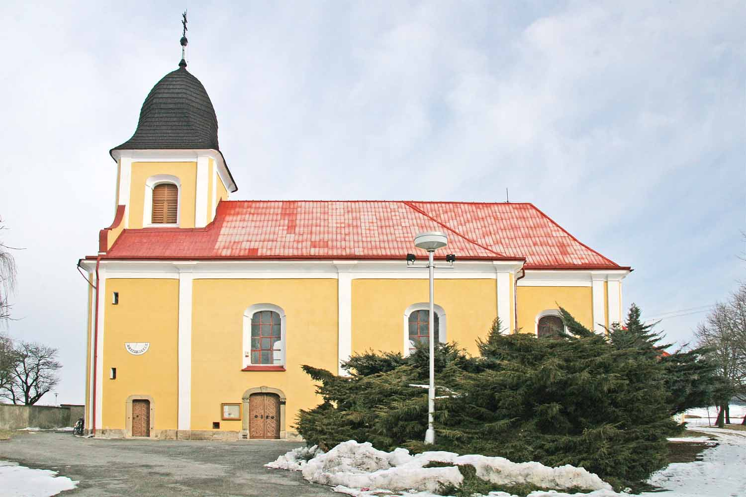 Kostel Zvěstování Panny Marie v Ostřetíně